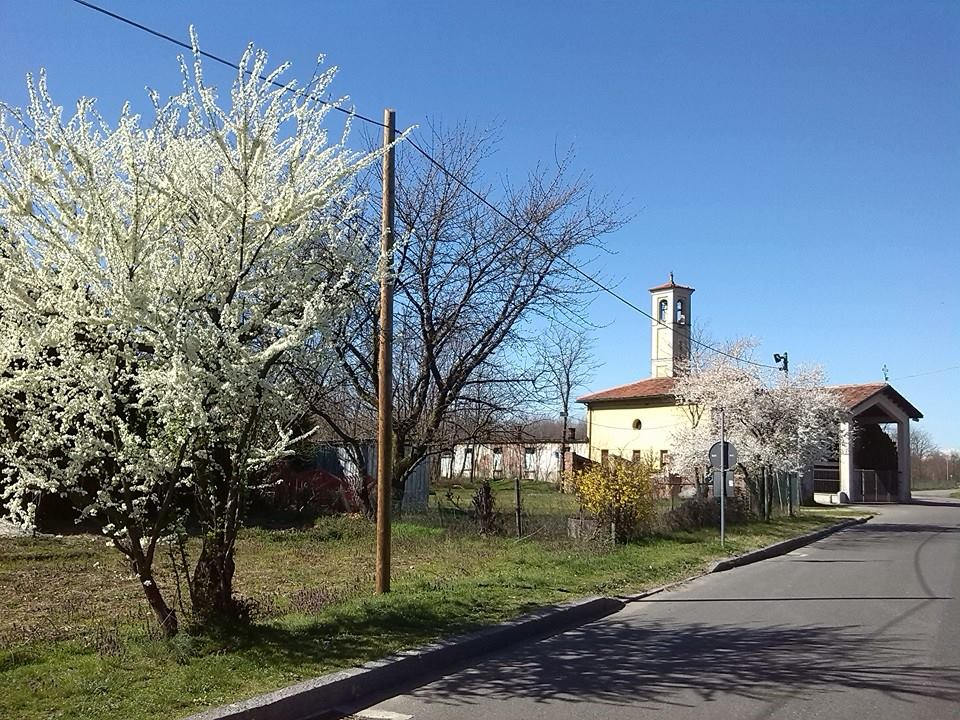 La Chiesa di Madonna in Veroncora a Busto Arsizio in una giornata di marzo.